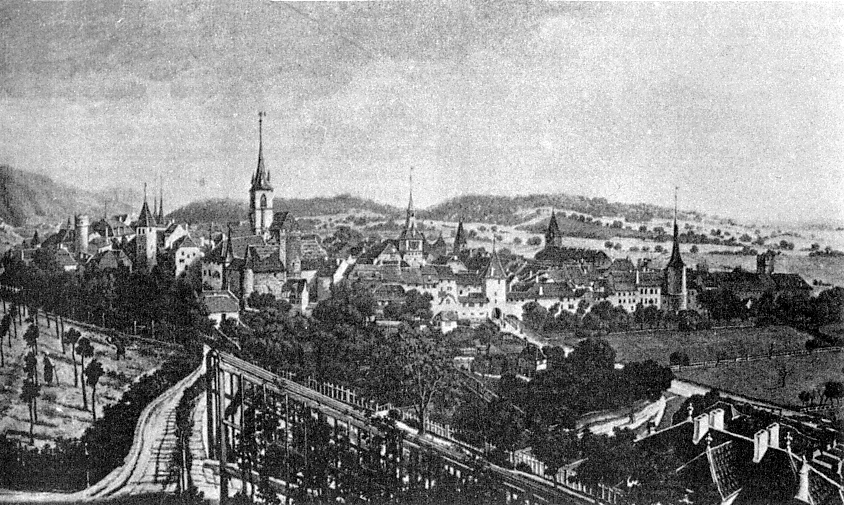 Biel von Westen, 1805